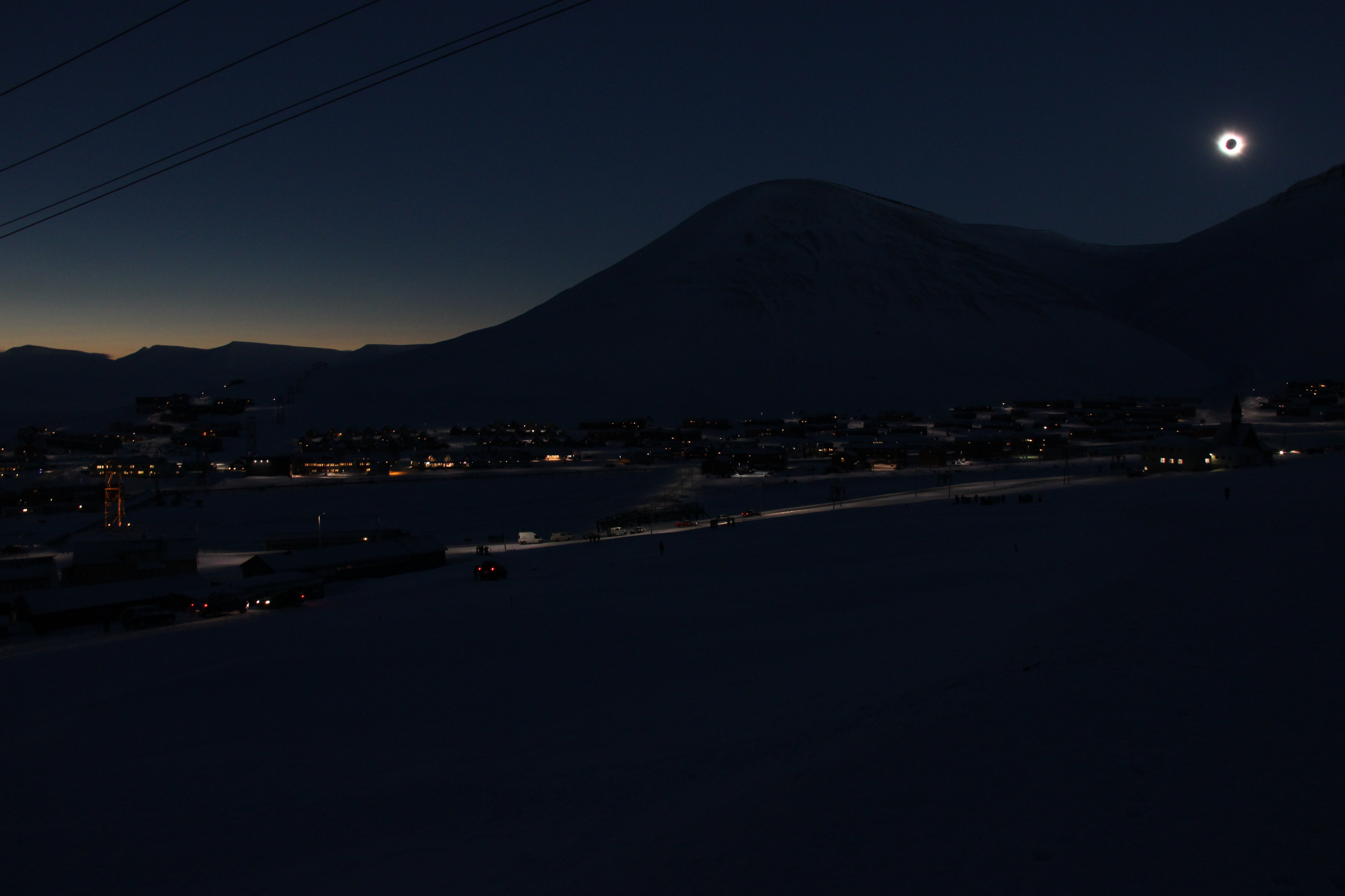 Солнечное затмение на фоне города на Шпицбергене